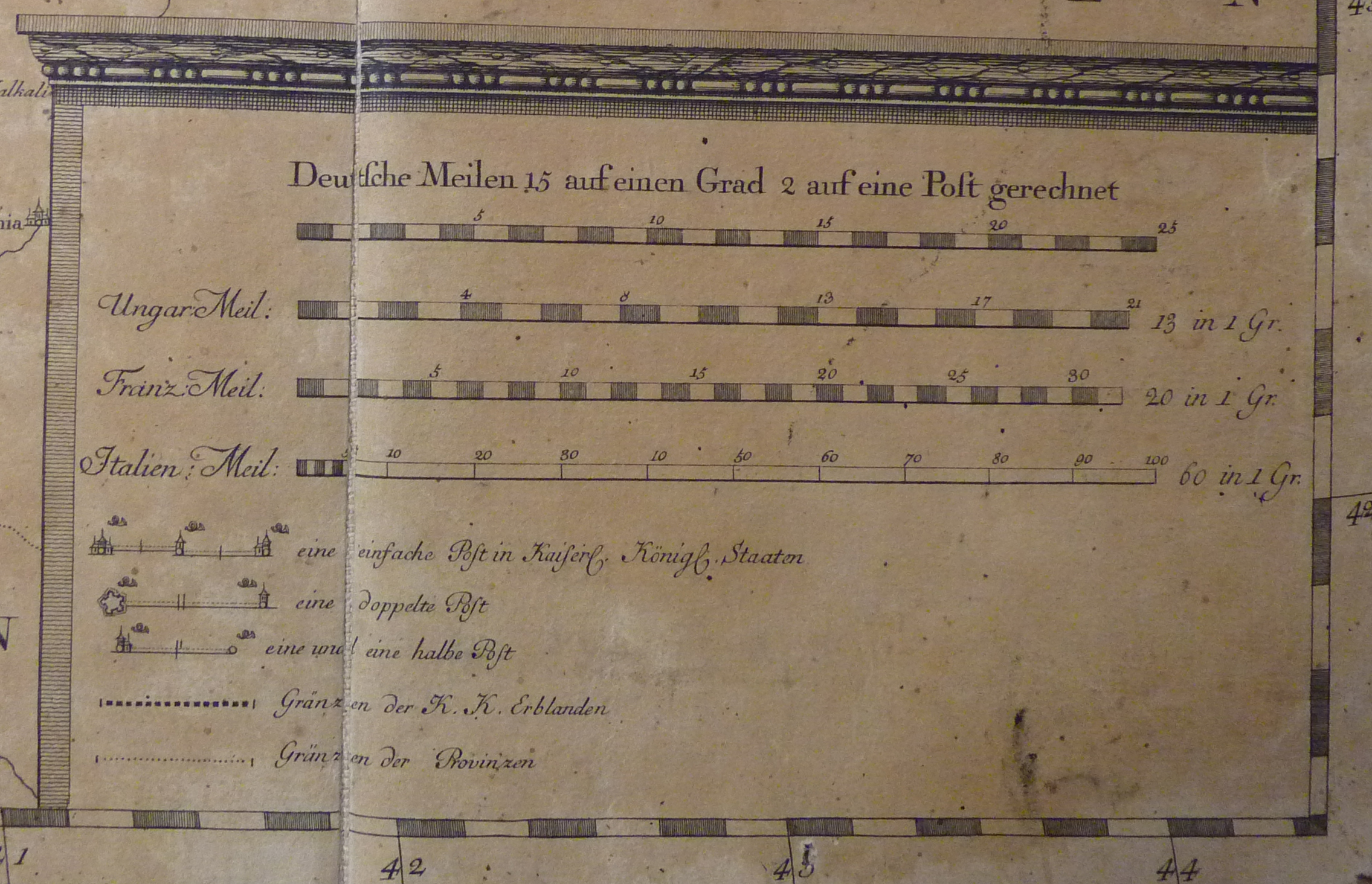 Ausschnitt zu den Maßeinheiten der Landkarte der österreichischen Erbländer